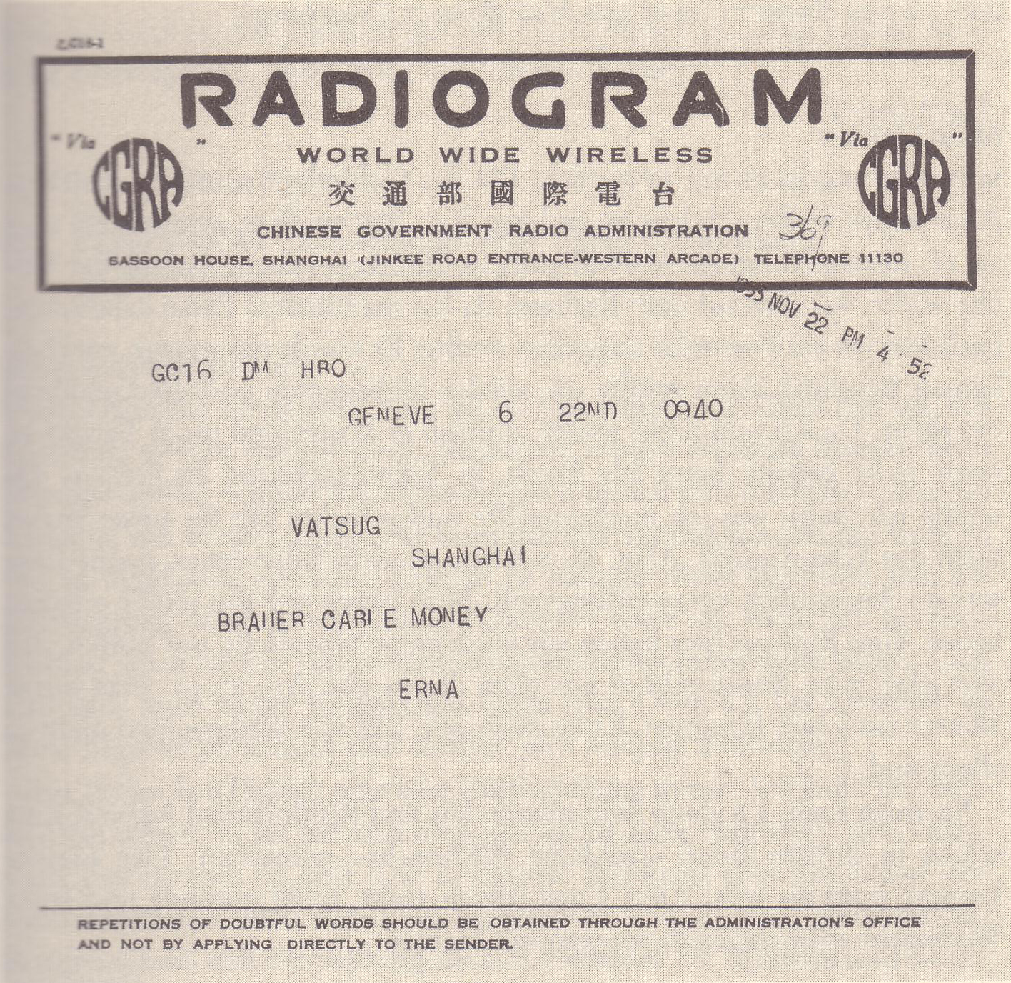 Telegram Erna Brauer (Geneva, Switzerland) to Max Brauer (China), end of 1933 // Telegramm Erna Brauer (Genf) an Max Brauer (China) von Ende 1933